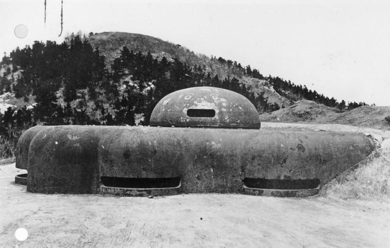 Eine Erinnerung an die tapfere Verteidiung der deutschen Festung Tsingtau im fernen Osten! Am 7. November 1914 fiel nach einer elfwöchigen Belagerung und nach einer neuntägigen ununterbrochenen Beschießung durch Land- und Schiffsartillerie schwerster Kaliber und nach Erschöpfung sämtlicher Verteidigungsmittel Tsingtau, das deutsche Bollwerk im fernen Osten in die Hände der Japaner. 1923 wurde das ganze Gebiet Kiautschou durch den Vertrag von Washington an China zurückgegeben und das deutsche Eigentum freigegeben. Ein Verteidigungsstand mit Geschütztürmen auf den Festungswällen in Tsingtau.